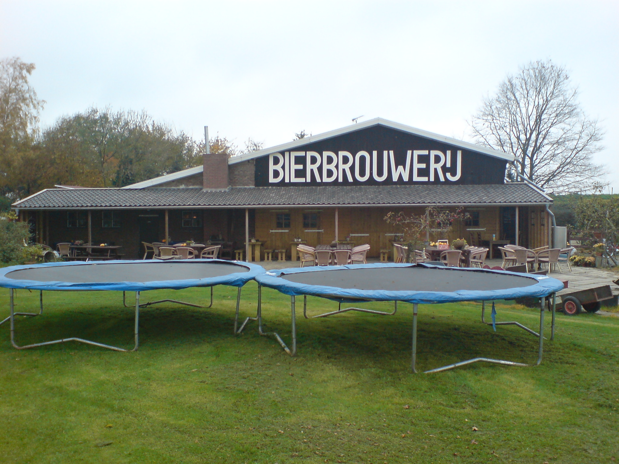 Specialbierbrouwerij. foto van het terras van Speciaalbierbrouwerij Oijen.